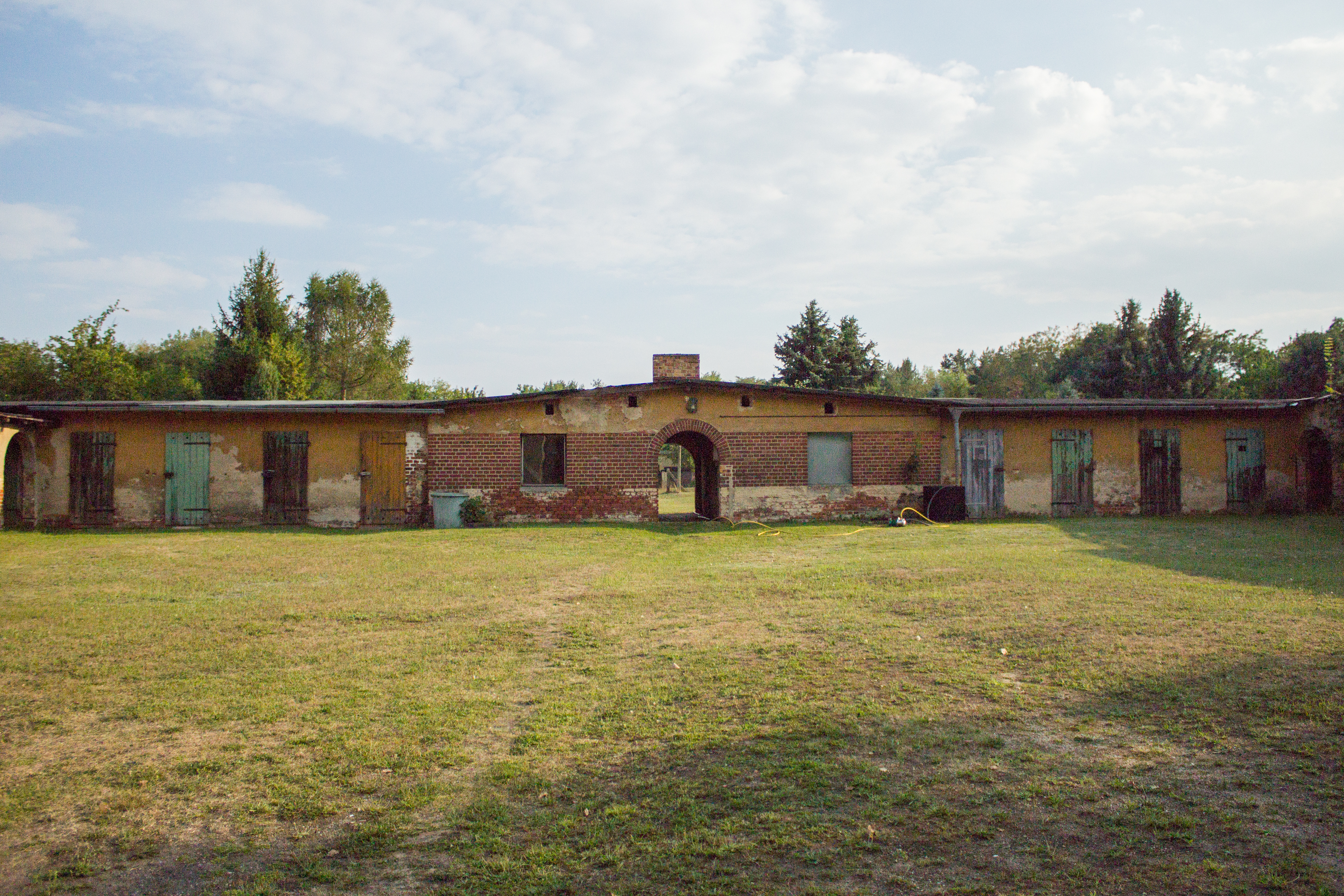 Hinterhof Waldstraße, Sibirien (Welzow)